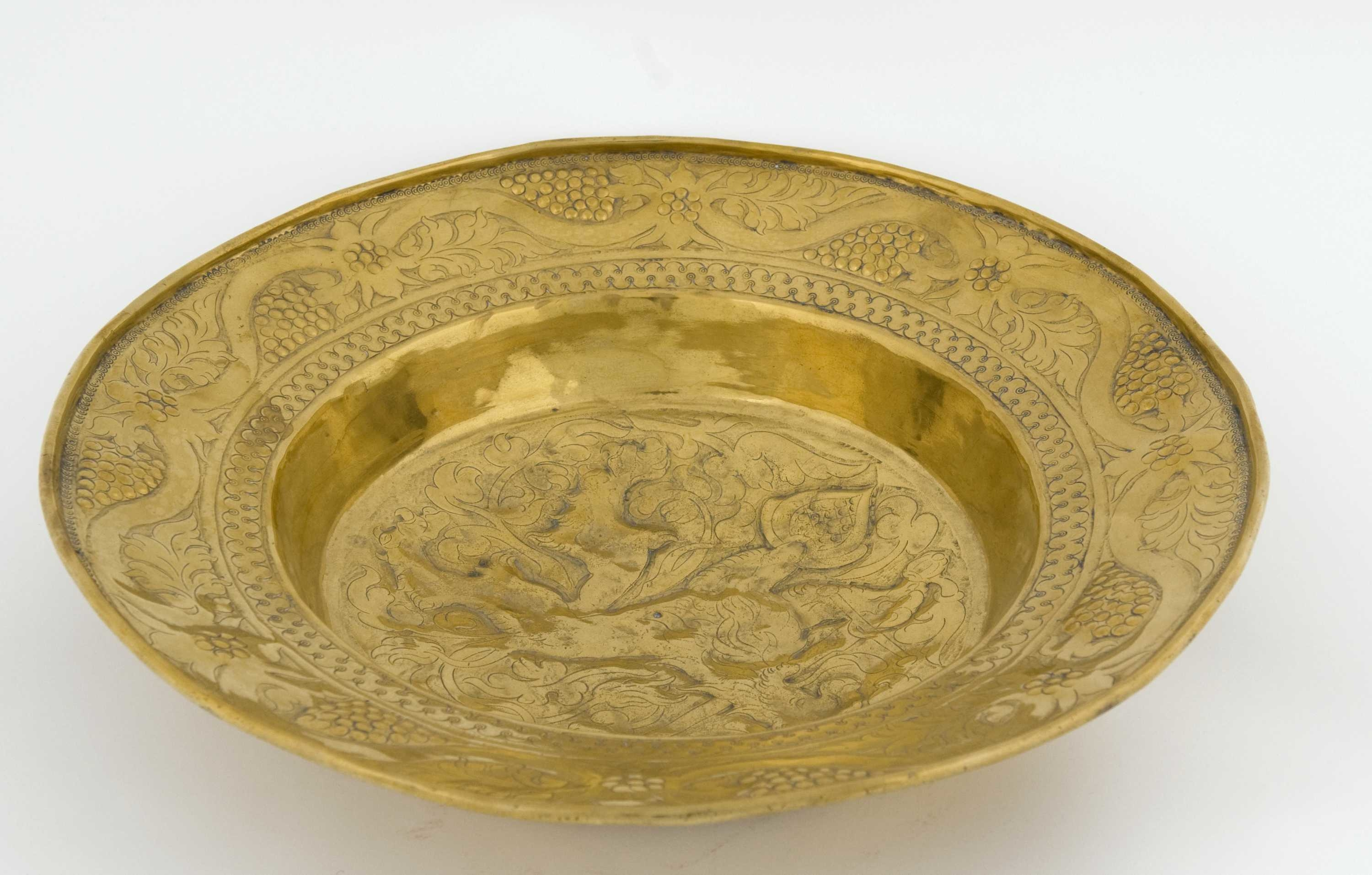 Døpefat fra 1600 - 1650 (KAT). Produksjon: tysk. Brukssted: Buskerud, Gol. Motiv: Løve med sverd og skjold Mål:Diameter: 39.3 cm. Høyde (Noe vanskelig å måle da fatet ikke står bent): 9 cm Materiale:Messing Teknikk:Trykket, drevet, loddet Farge:Polert messing Dekorteknikk:Drevet og gravert